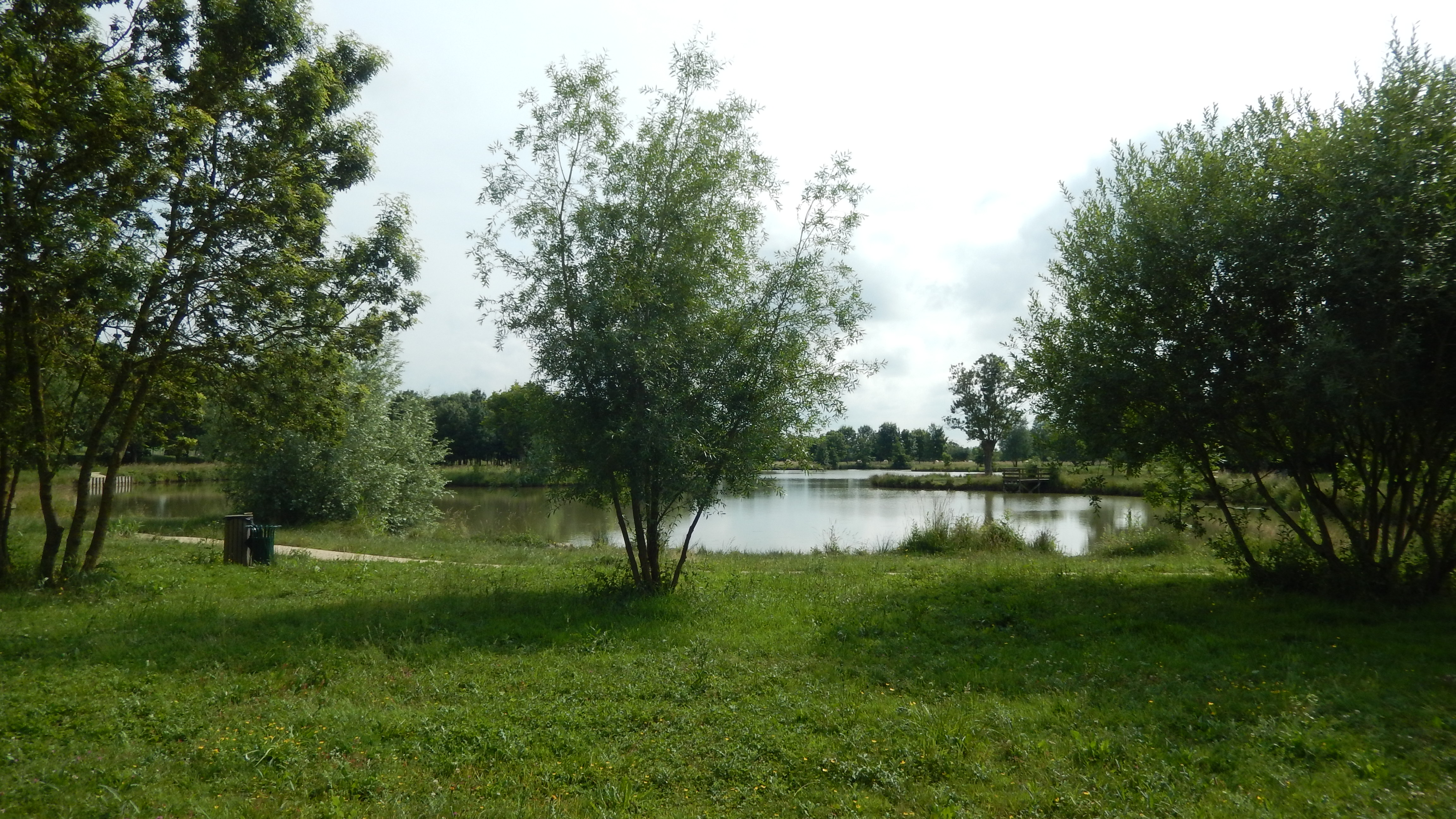 Un étang prisé par les pêcheurs et les promeneurs, situé à Cabariot (Charente-Maritime, France).